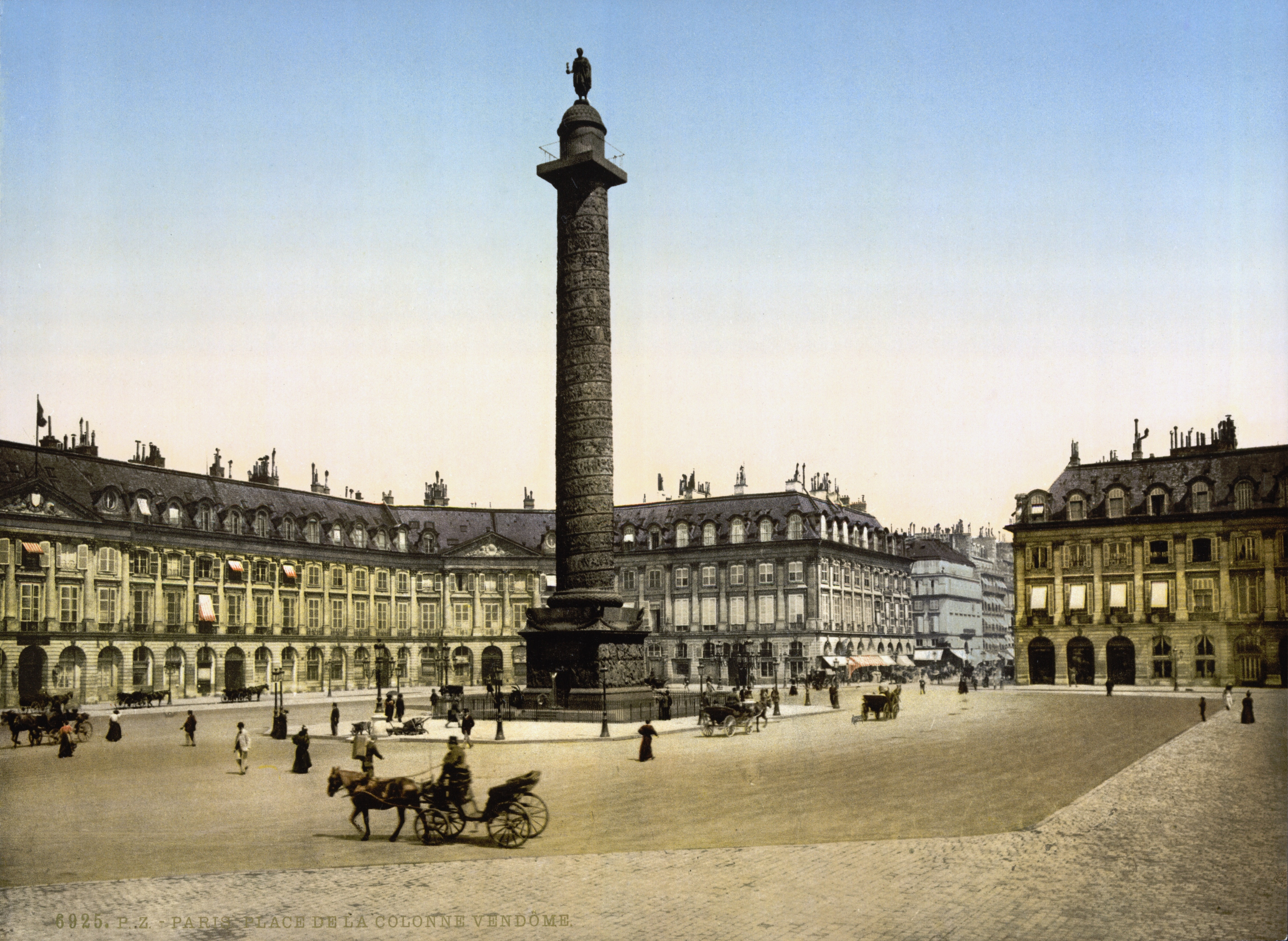 Place Vendome, Paris, France.